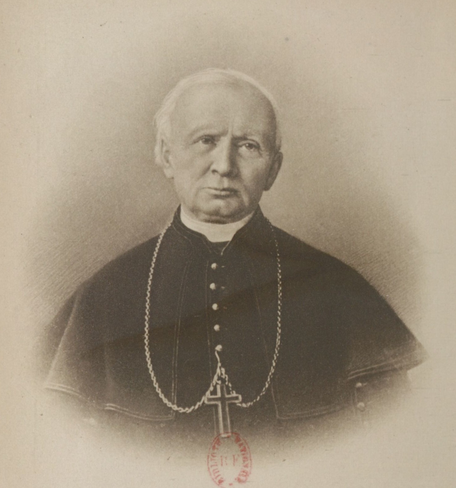 Monseigneur Isoard (1820-1901), évêque d'Annecy